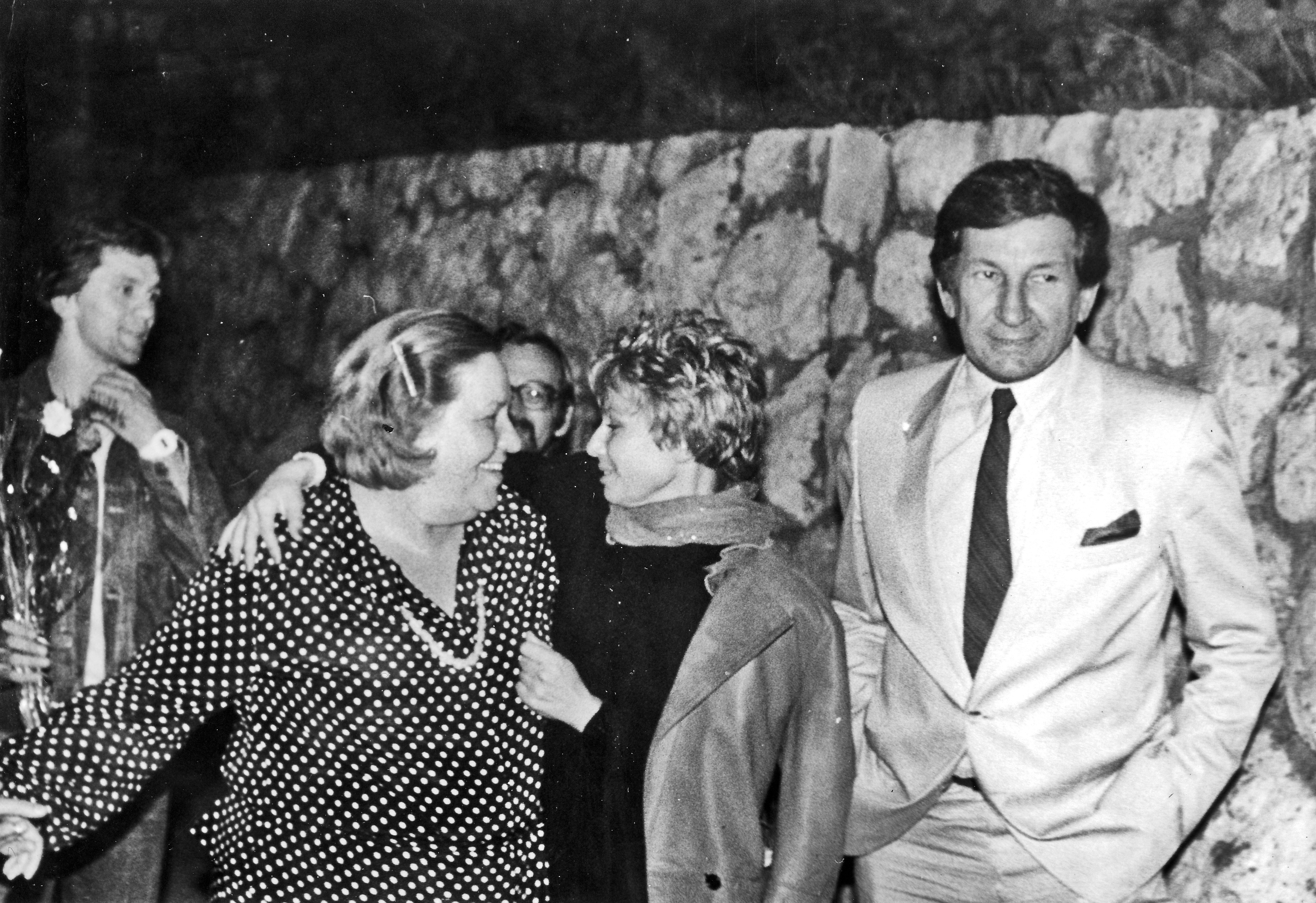 Radmila Savićević, Neda Arnerić i Relja Bašić na Filmskim susretima u Nišu 1984. godine. U pozadini je i Ljubiša Samardžić